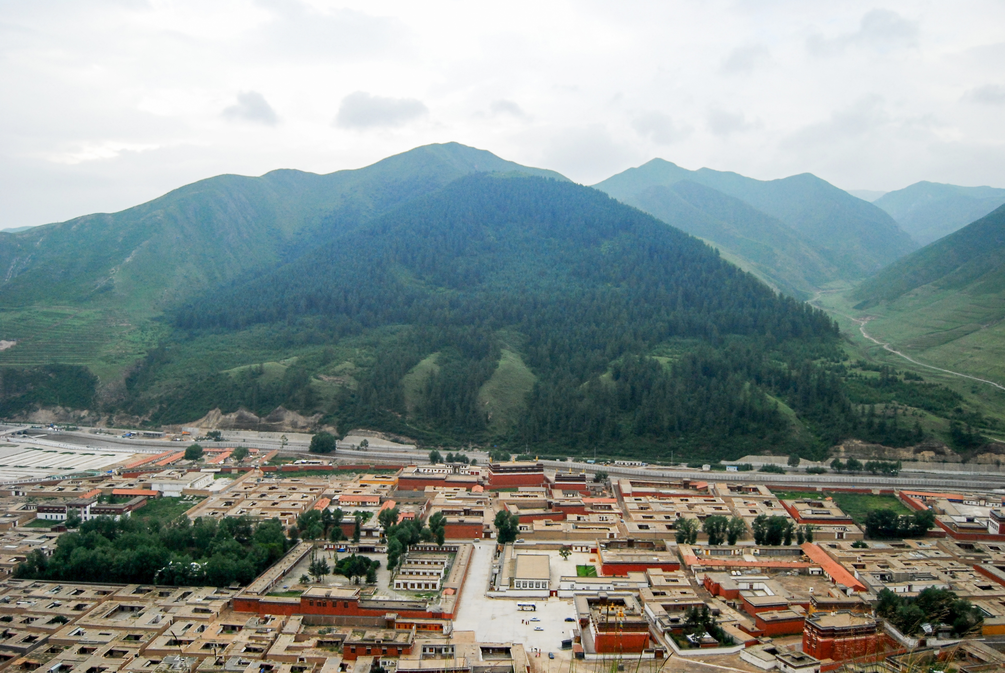 中文（中国大陆）: 拉卜楞寺僧舍俯瞰